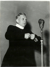 foto di oltre 20 anni Licensing Categoria:Zeno Saltini